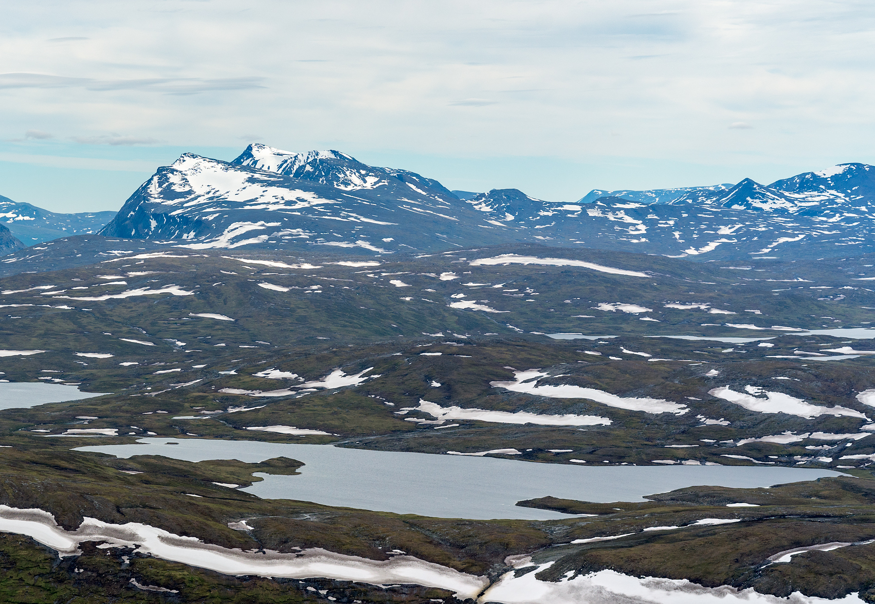 Vy mot Liemakjávrre från 1430 på Álátjåhkkå.